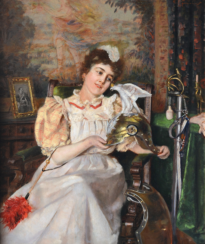 Die Rüstung des Helden. Signiert und datiert Paul Spangenberg 1899.